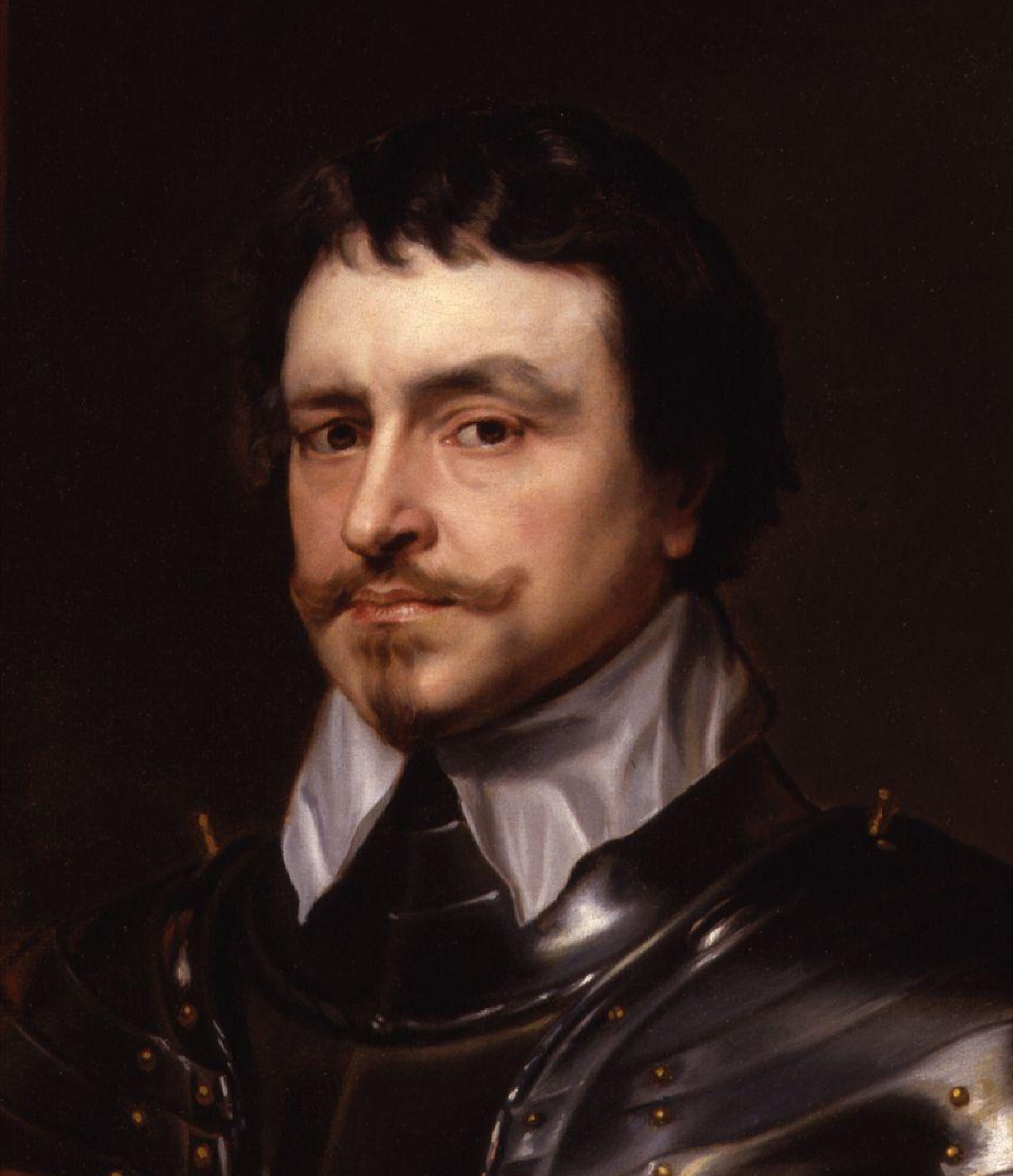 Thomas Wentworth, 1st Earl of Strafford, by Sir Anthony Van Dyck (died 1641), given to the National Portrait Gallery, London in 1938. All images in this batch have been confirmed as author died before 1939 according to the official death date listed by the NPG.